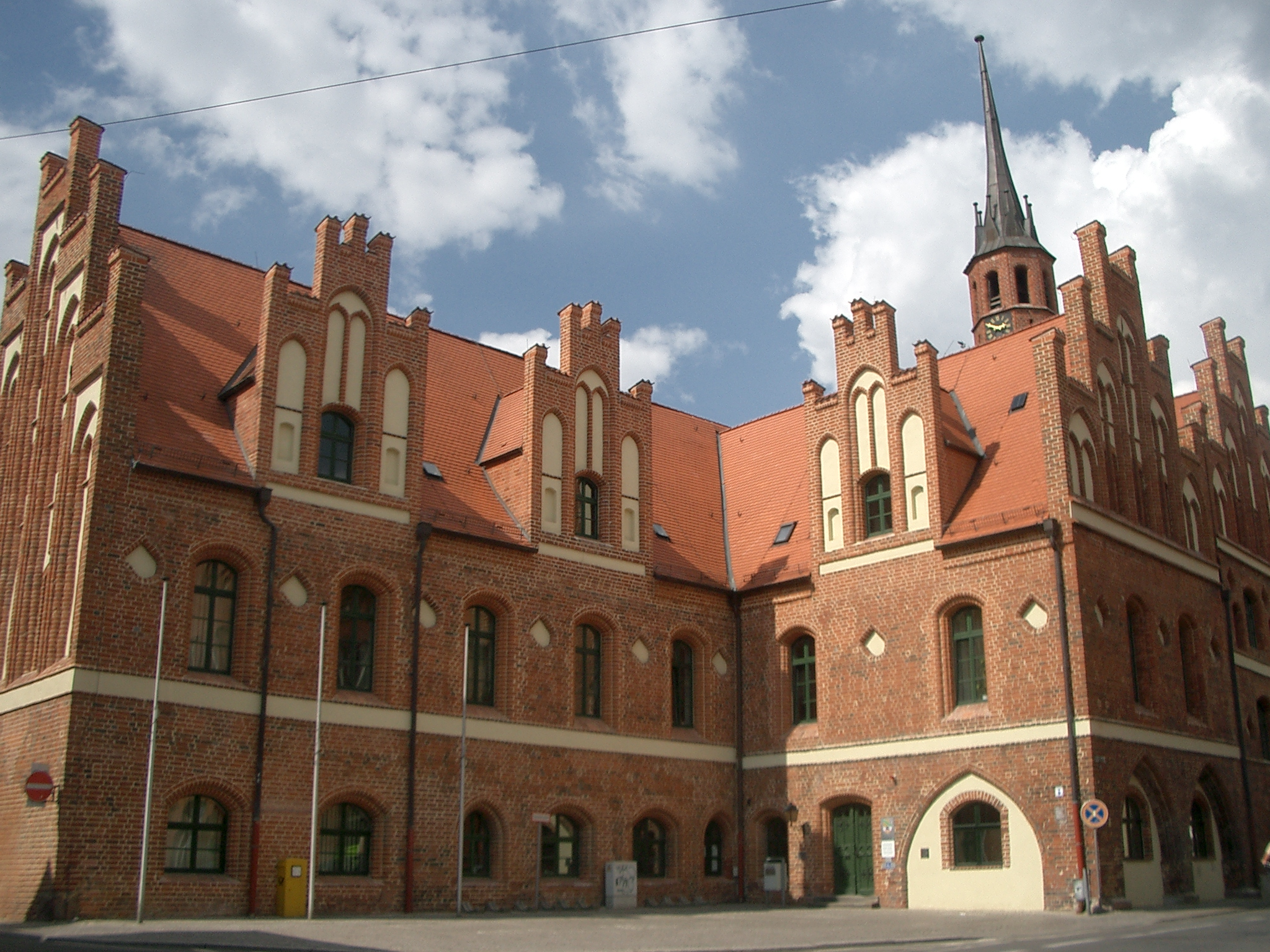 ehem. Rathaus Altstadt und heute Sitz des Amtsgerichtes